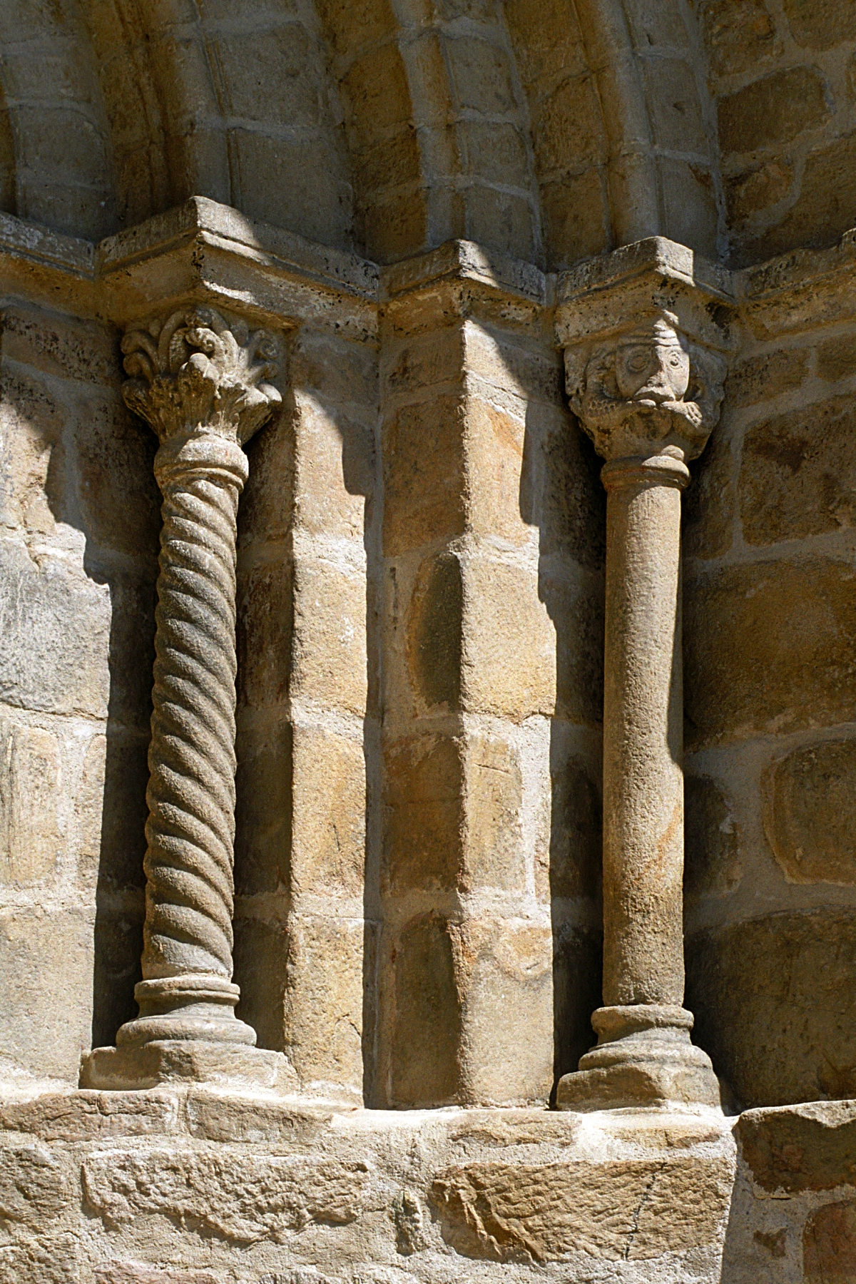 Dore-l'Eglise : colonnes